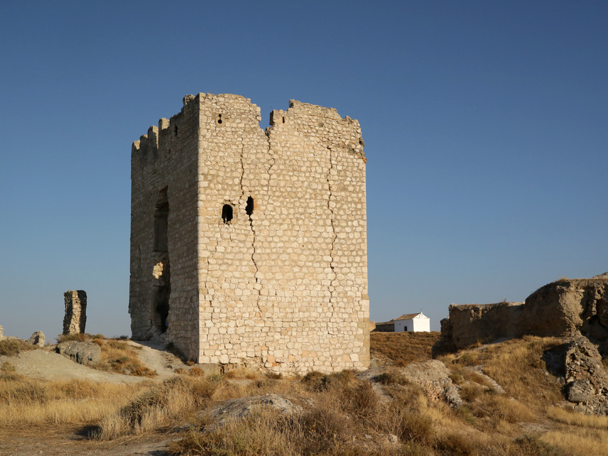 Torre del homenaje del castillo de Oreja, cerca de Ontigola y Aranjuez. En el fondo, la ermita encalada de blanco.